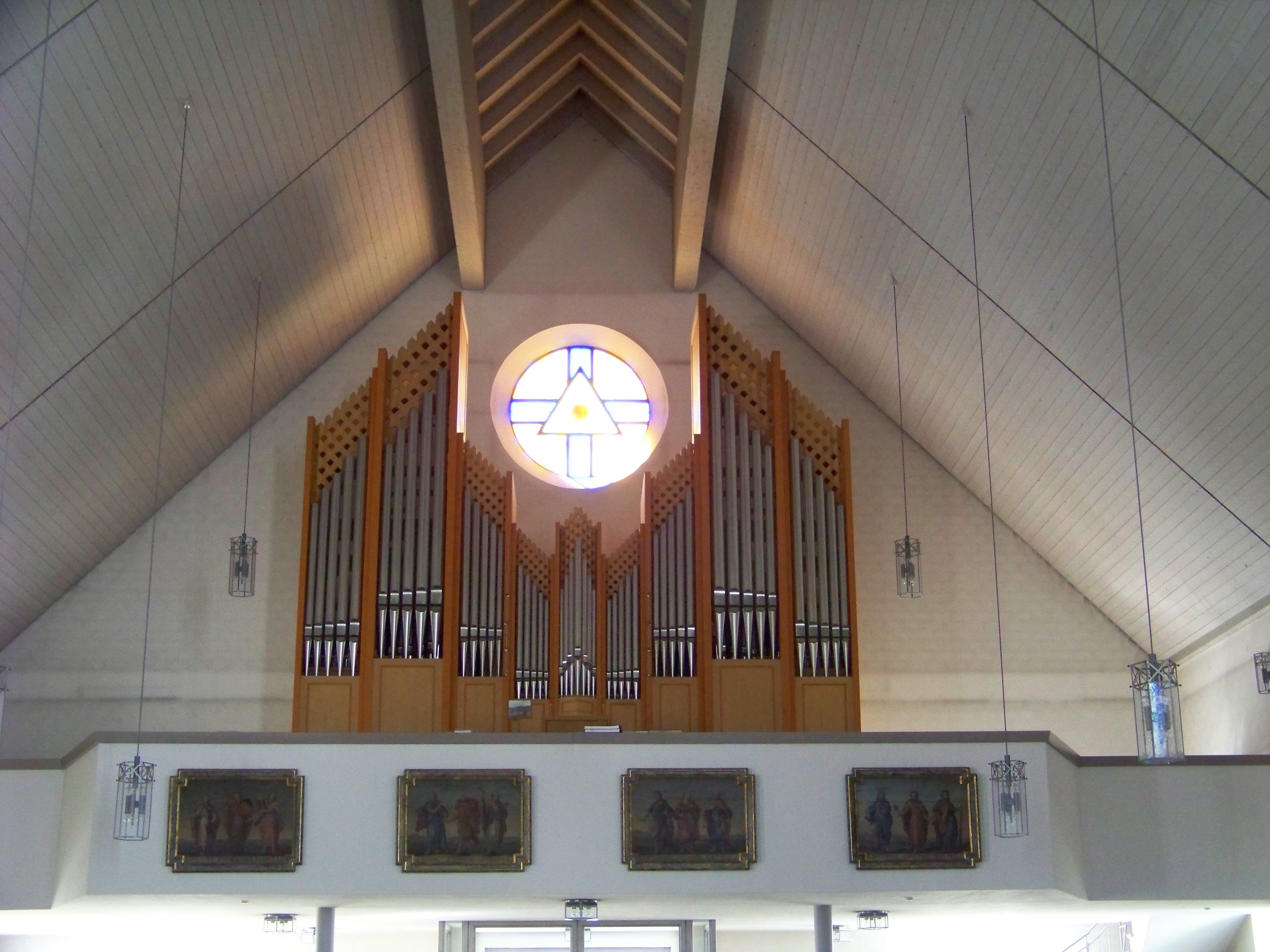 Landau an der Isar. Niederhöcking, Dingolfinger Straße 33. Pfarrkirche St. Martin. 2002 wurde auf der Südempore eine Orgel von der Allkofener Orgelbaufirma Thomas Jann mit 22 Registern eingebaut.